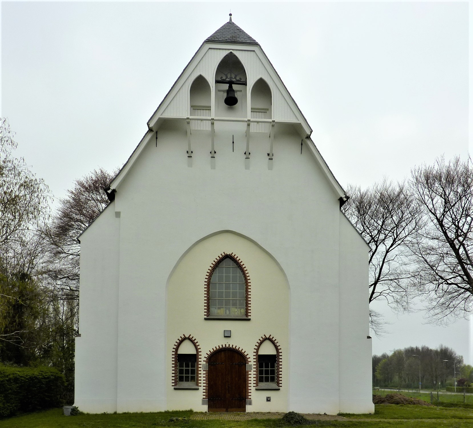 Nederlands Hervormde Kerk, Overasselt